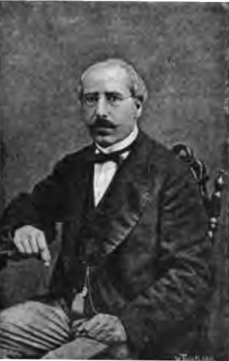 Picture/portrait of Carlo Kunz from "Rivista italiana di numismatica 1888.djvu p. 85 (../110)